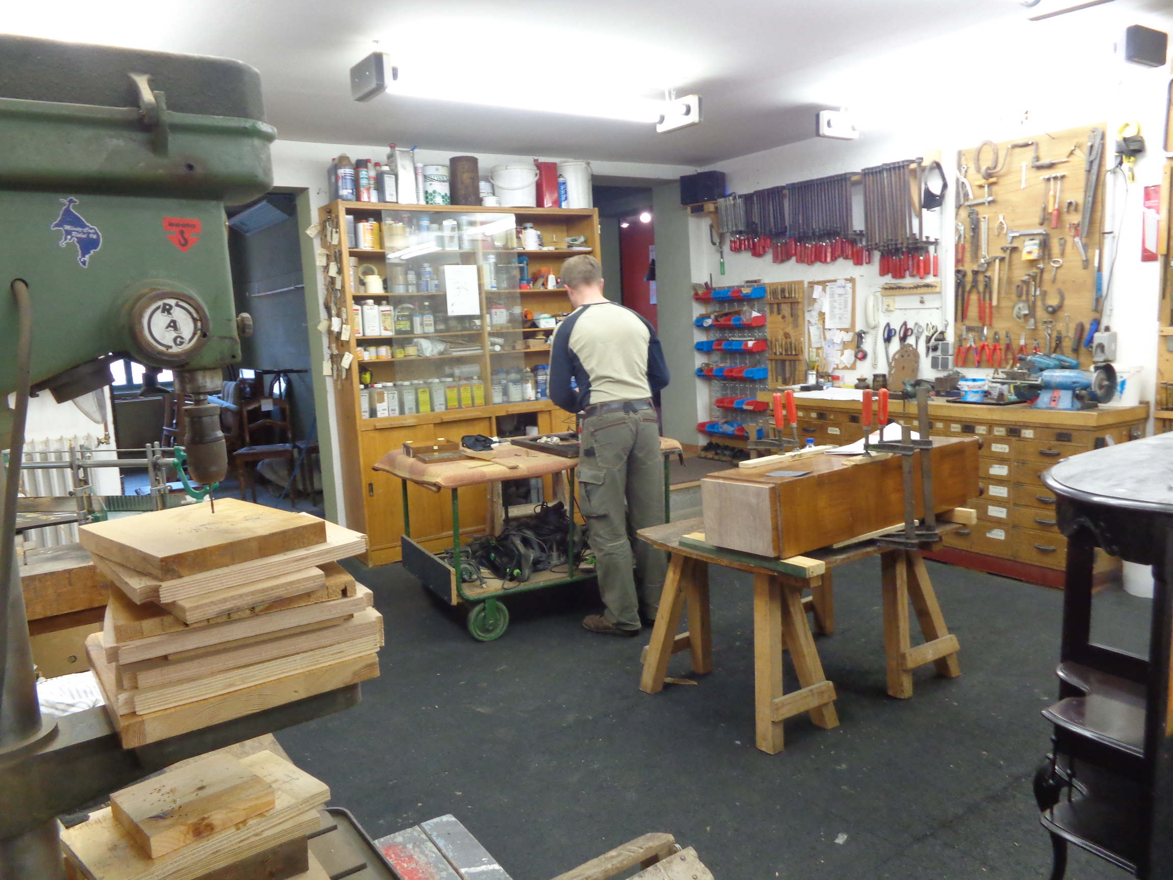 Werkstatt einer Tischlerei in Plau am See